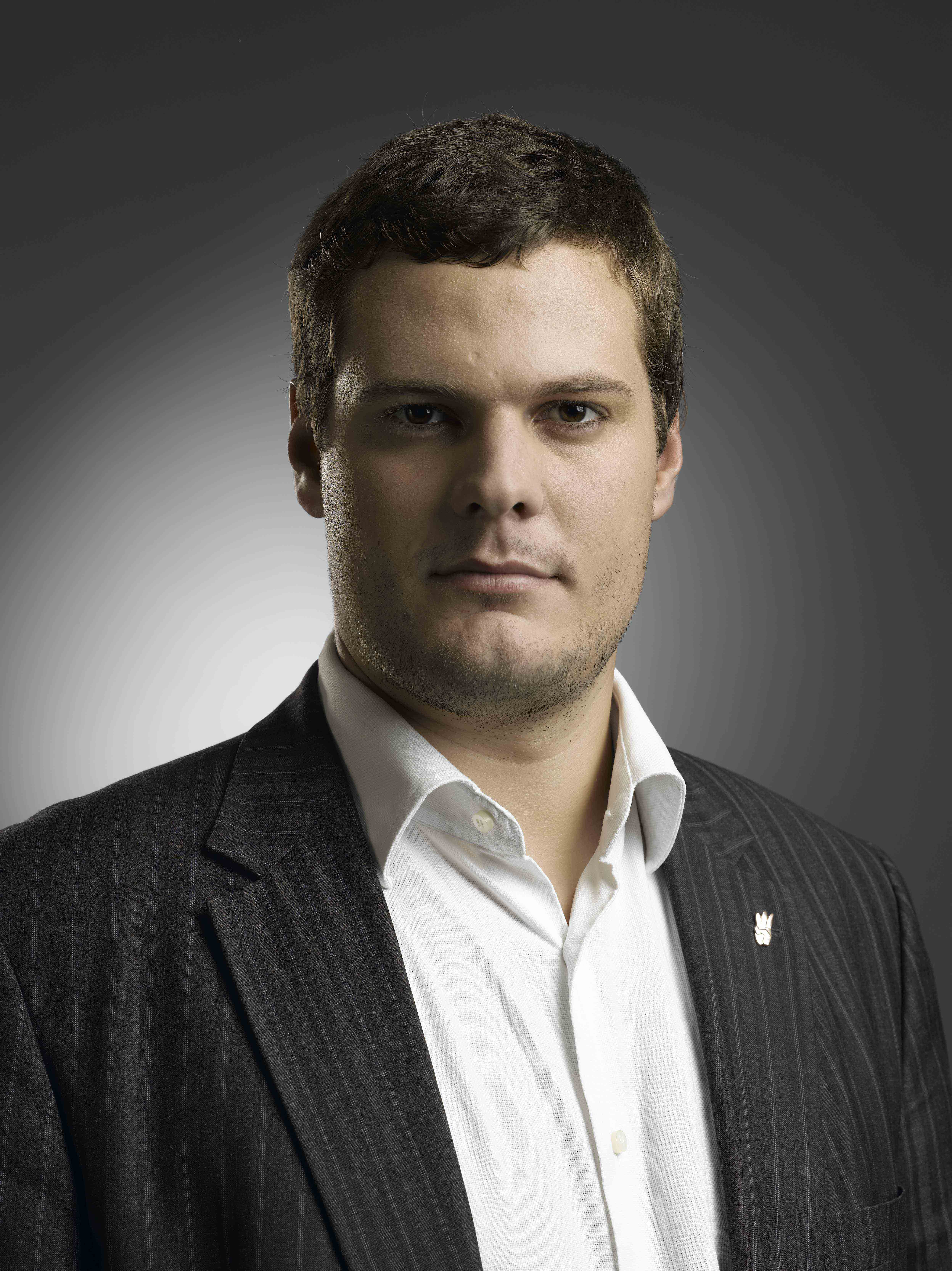 Офіційне фото Андрія Іллєнка